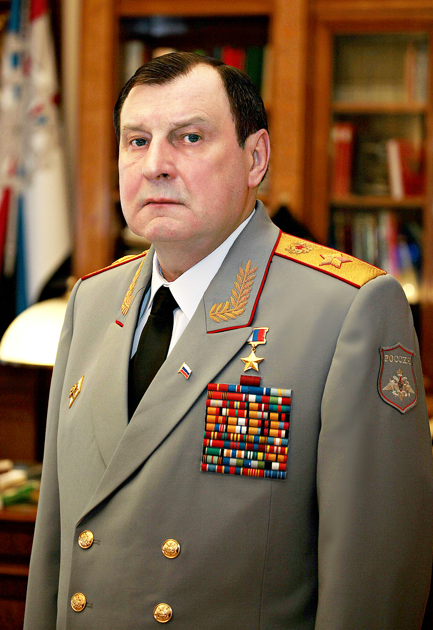 Заместитель Министра обороны Российской Федерации, генерал армии Булгаков Дмитрий Витальевич